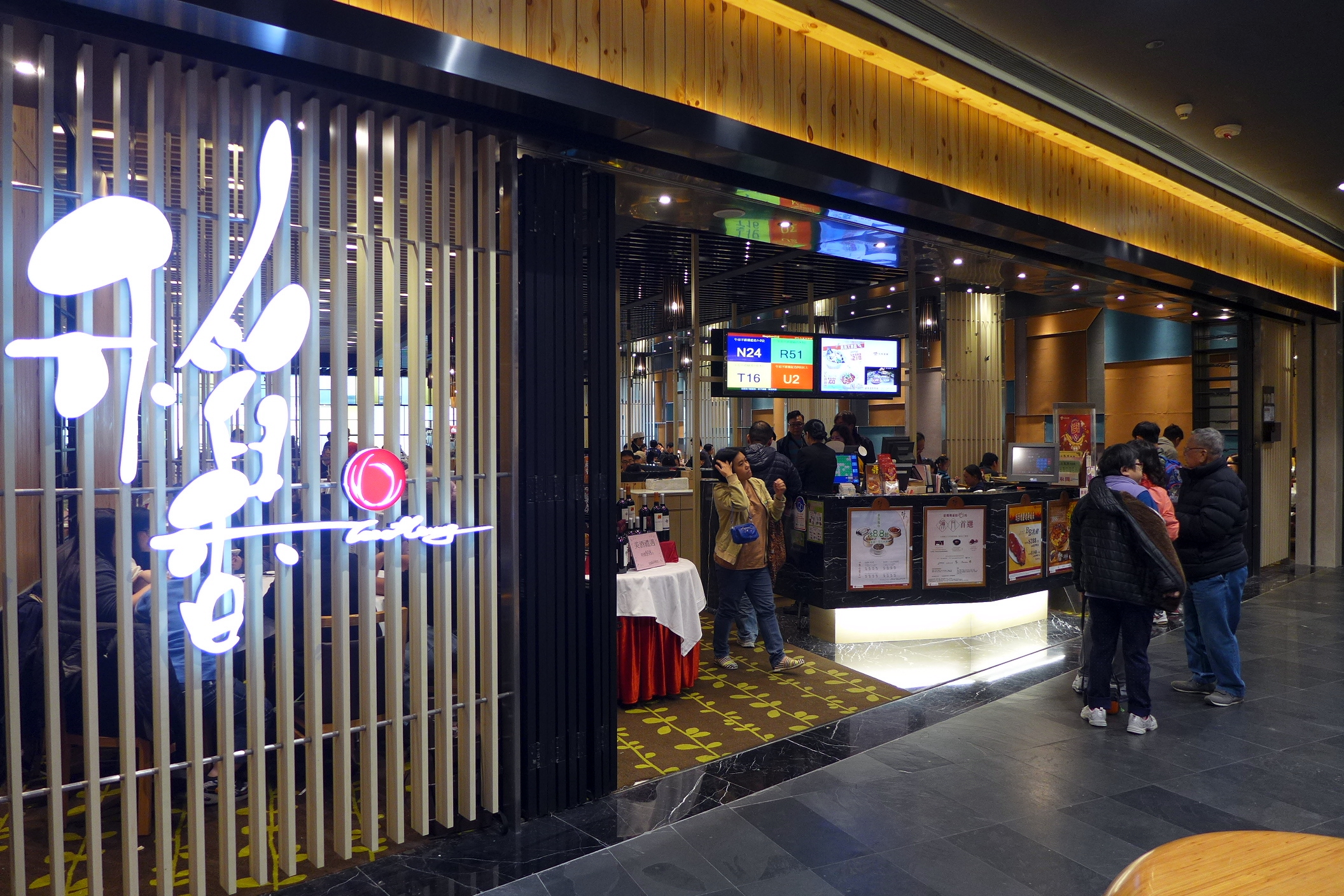 Taoheung in MegaBox